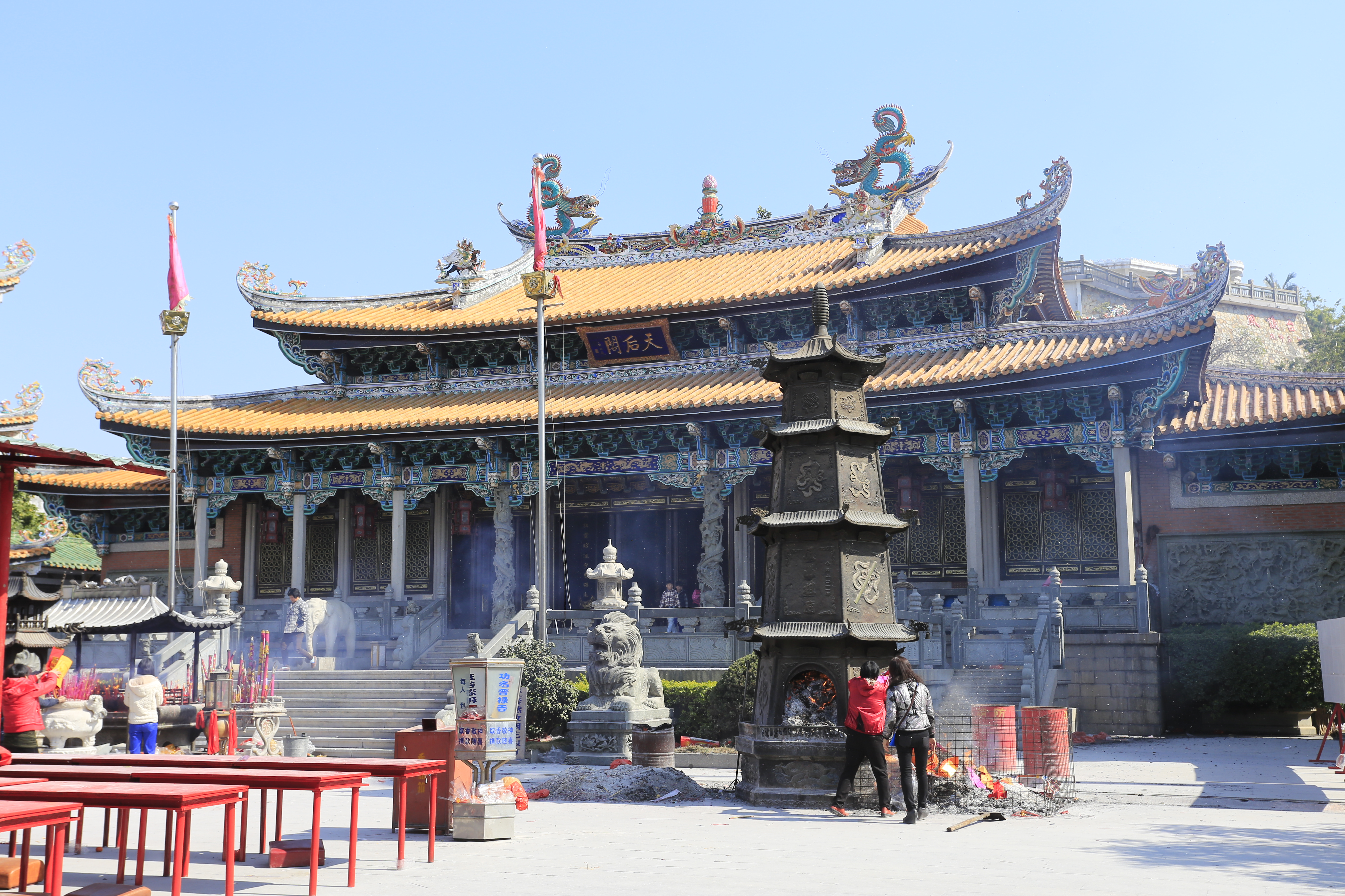 汕尾鳳山祖廟 大殿